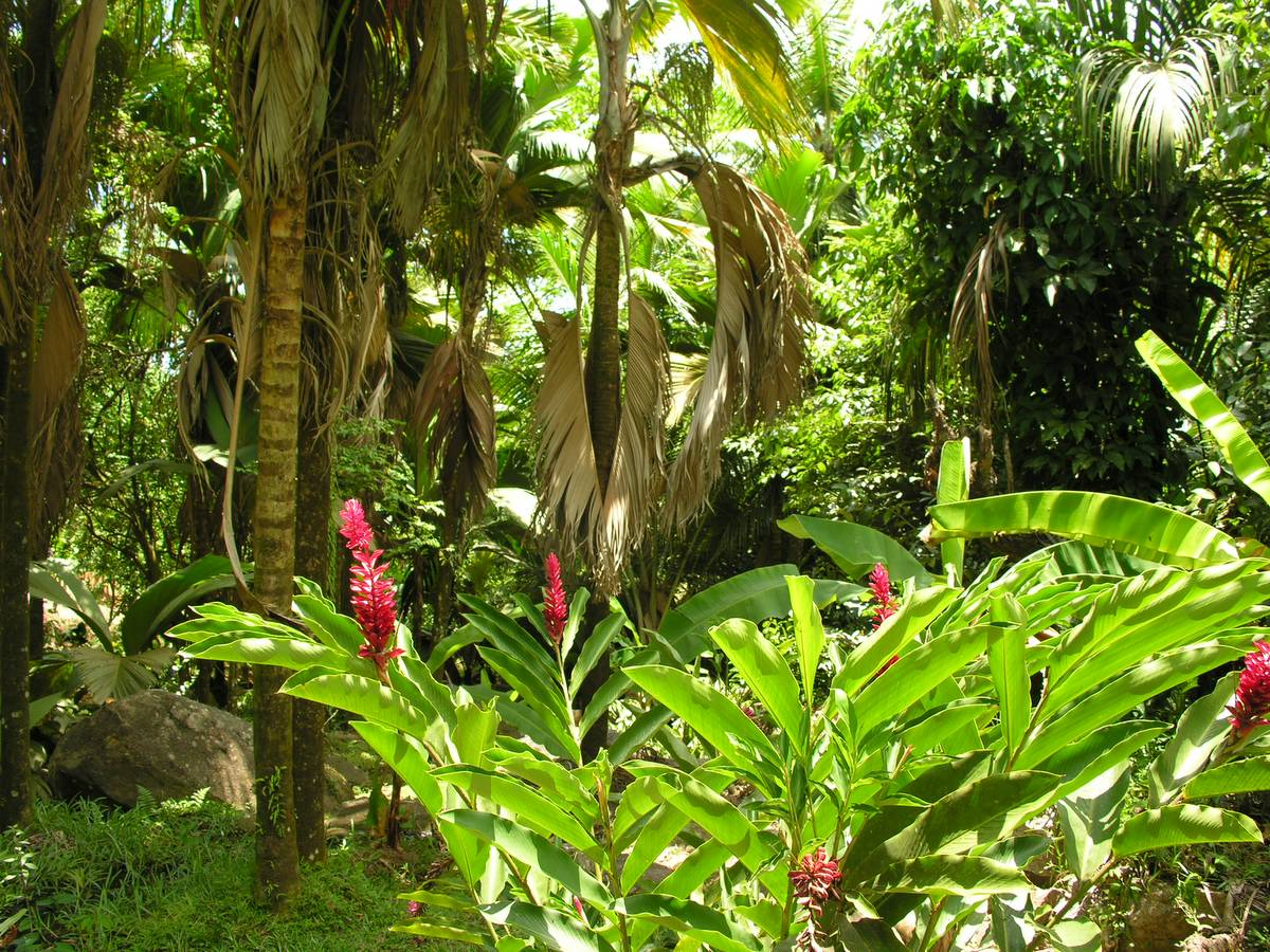 Seychelles, Mahé Island